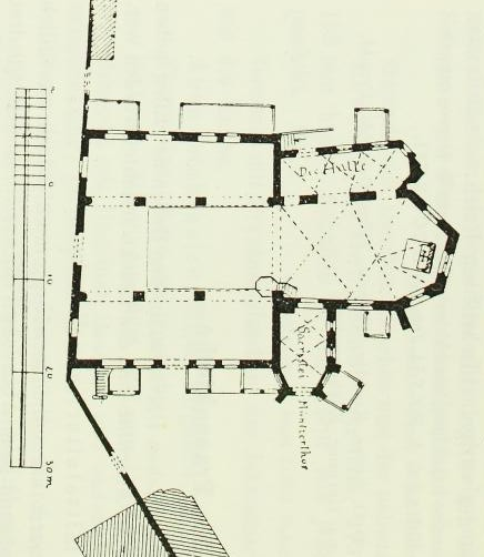 Grundriss der alten Frauenkirche in Dresden von Cornelius Gurlitt